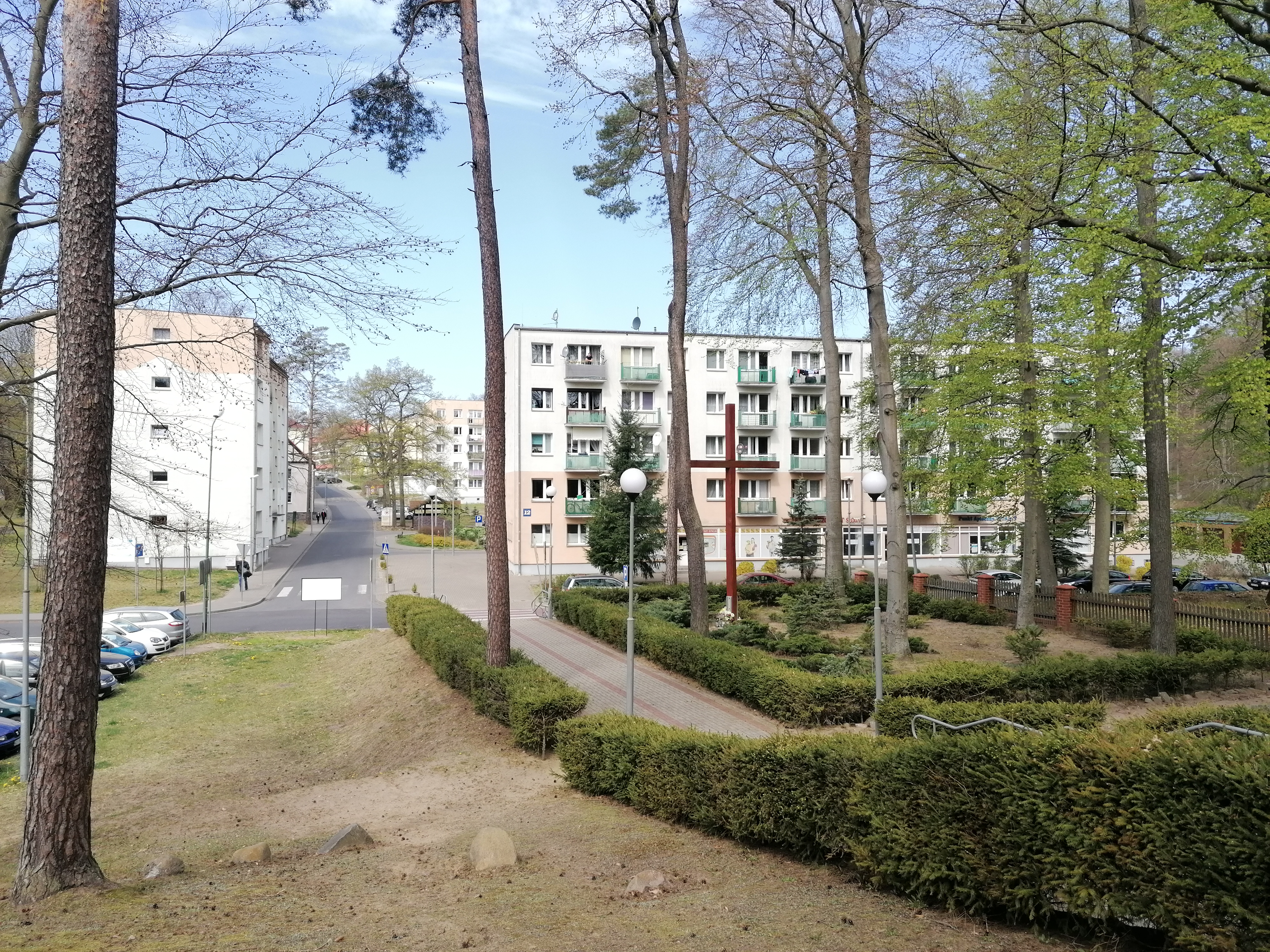 Osiedle Wędrzyn